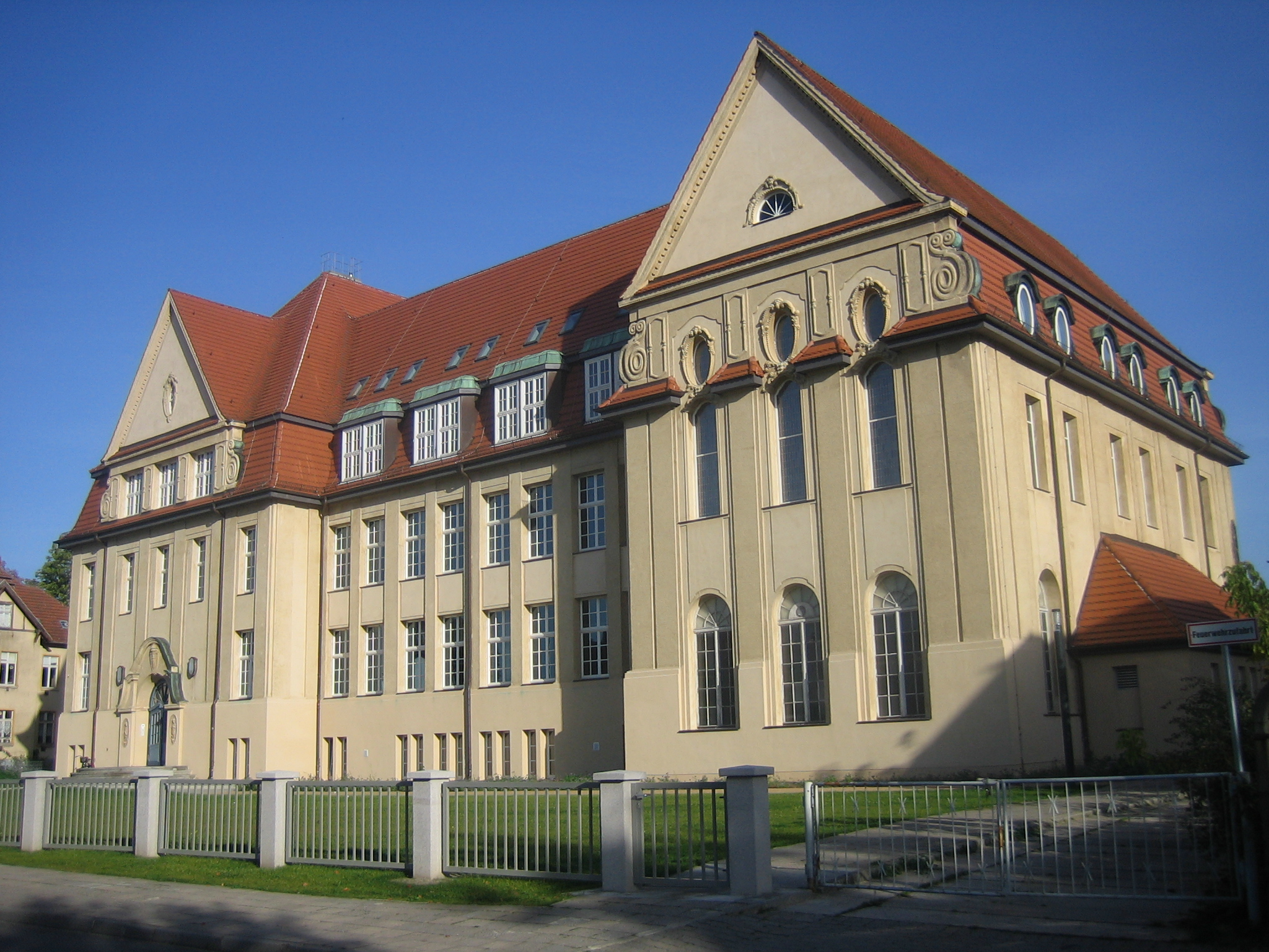 Lessing-Gymnasium (ehemaliges Lyzeum) in Neubrandenburg, Mecklenburg-Vorpommern, Lessingstraße 1; erbaut 1916; unter Denkmalschutz